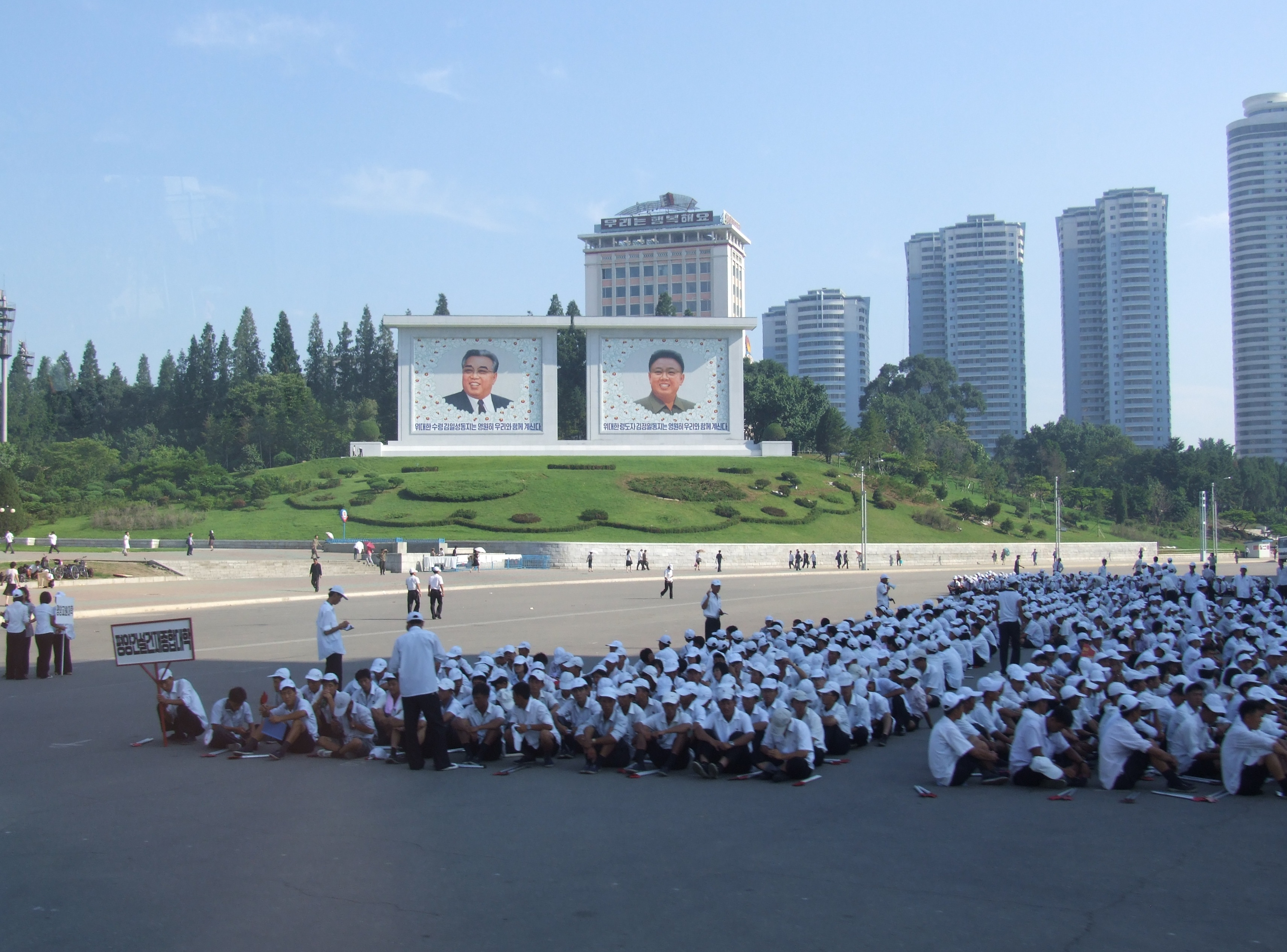 Kinder machen Pause